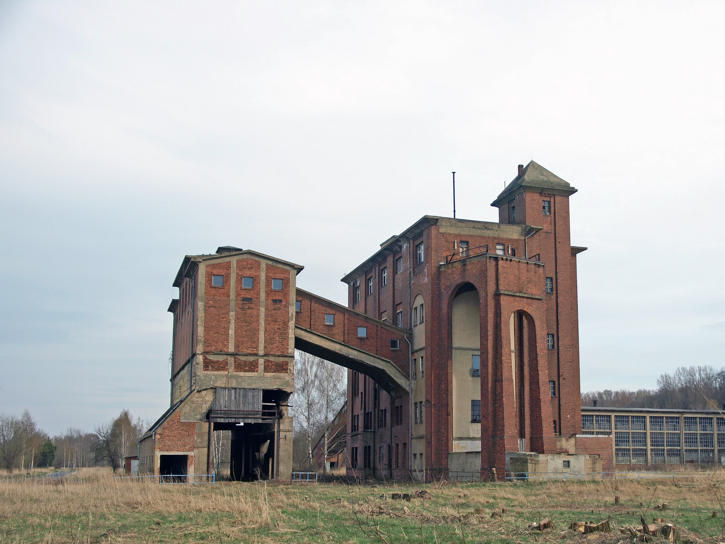 Hochbunker auf dem ehemaligen Tagebaugelände Berzdorf, gebaut 1924 für den ersten Tagebau als Aufnahmebunker, 1927 stillgelegt und 1953 wieder in Betrieb genommen, später Umbau zur Lehrwerkstatt